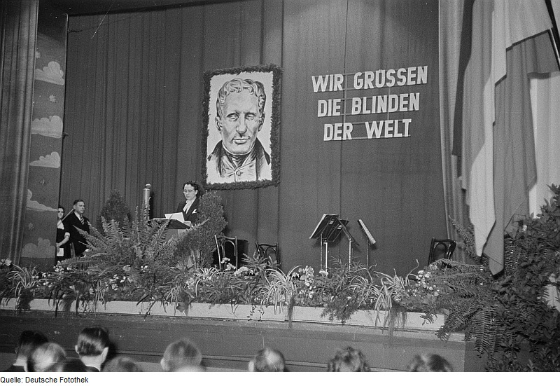 Original image description from the Deutsche Fotothek Ansprache der Staatssekretärin Ruth Fabisch